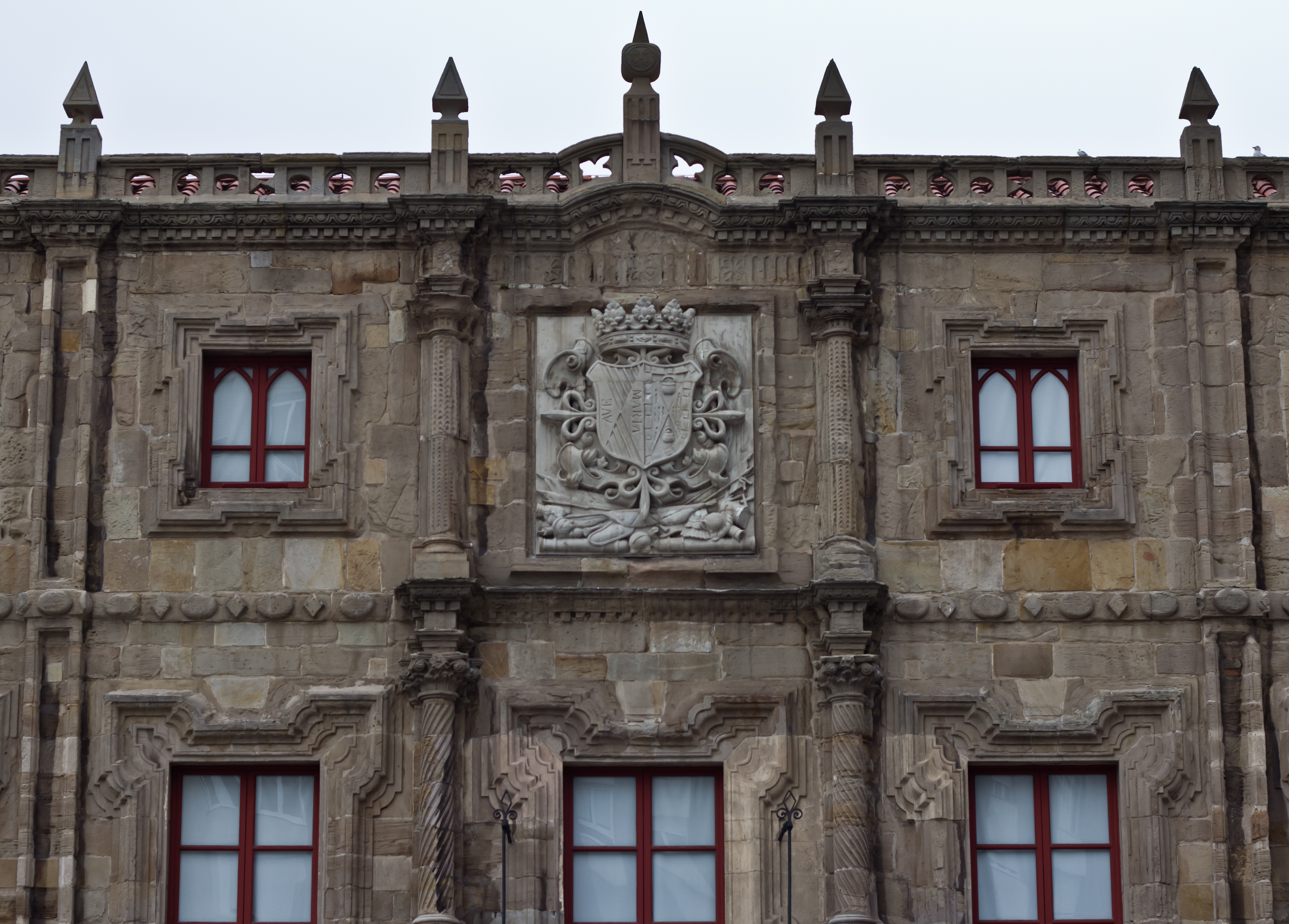 Fachada del Palacio de Revillagigedo, situado en la Plaza del Marqués (Gijón, ASturias)